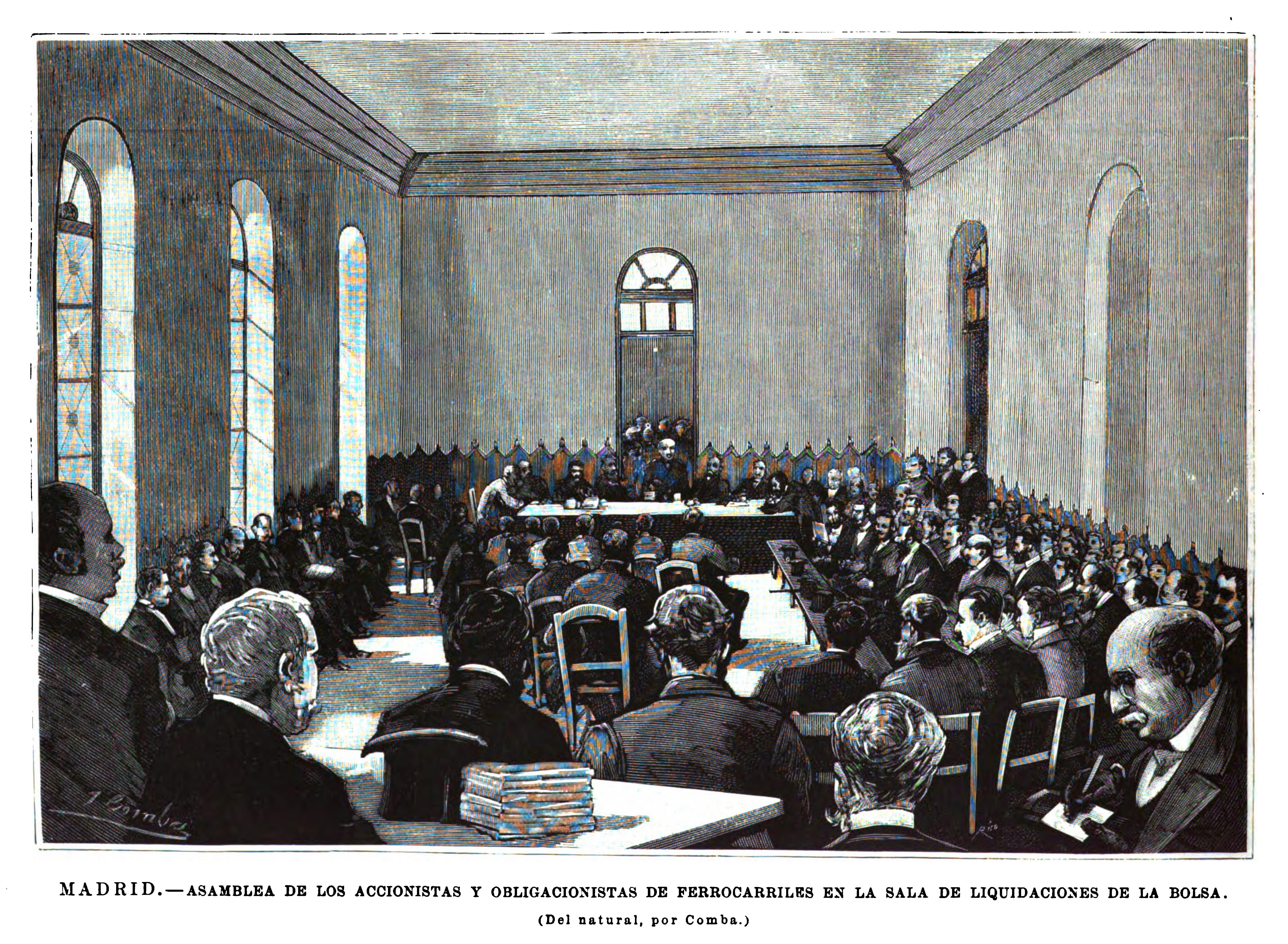 Madrid.—Asamblea de los accionistas y obligacionistas de ferrocarriles en la sala de liquidaciones de la Bolsa.